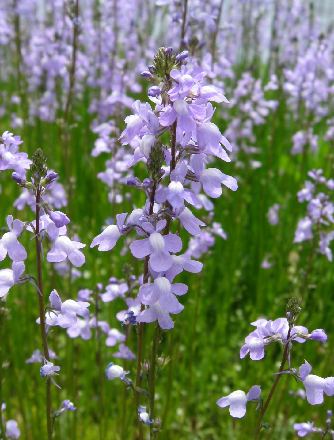 Linaria canadensis マツバウンラン (Linaria canadensis)